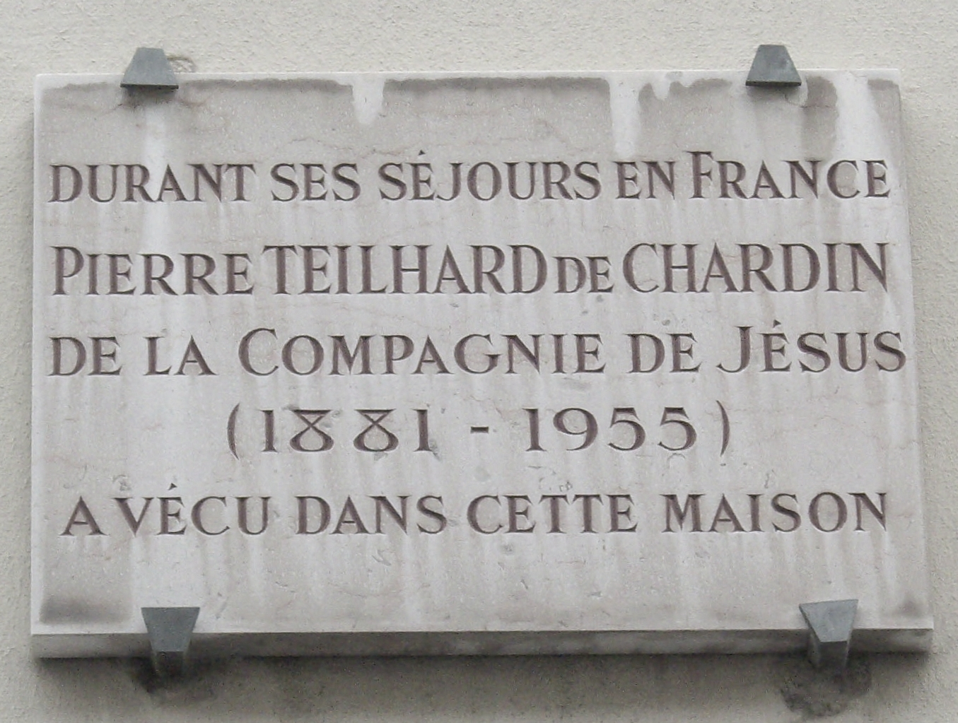 Plaque commémorative, 15 rue Monsieur, Paris 7e. « Durant ses séjours en France, Pierre Teilhard de Chardin, de la Compagnie de Jésus (1881-1955), a vécu dans cette maison. »